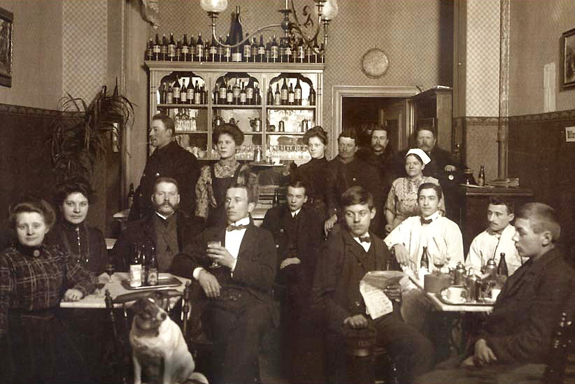 Presonal och gäster Restaurang Prinsen